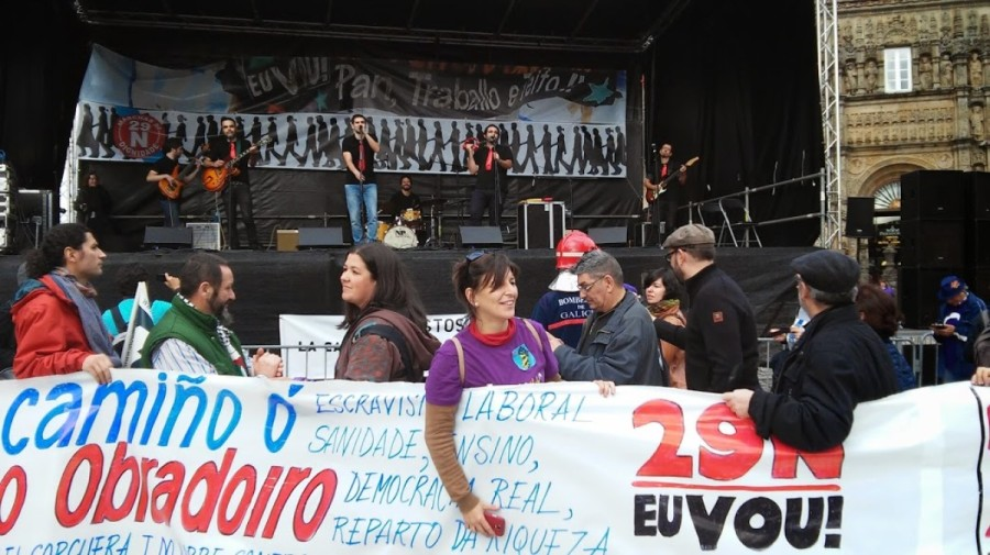 Yolanda Díaz durante a actuación de Ataque Escampe. 29N Marcha da Dignidade. Santiago de Compostela 2014.